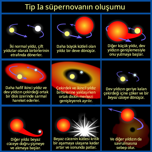 Tip Ia süpernovanın oluşumu